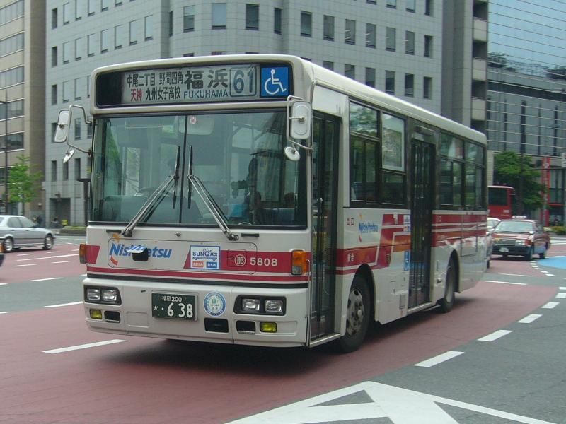 登録番号 福岡200か・638 西日本鉄道那珂川自動車営業所所属 車番5808 2007年4月30日 天神北交差点にて撮影